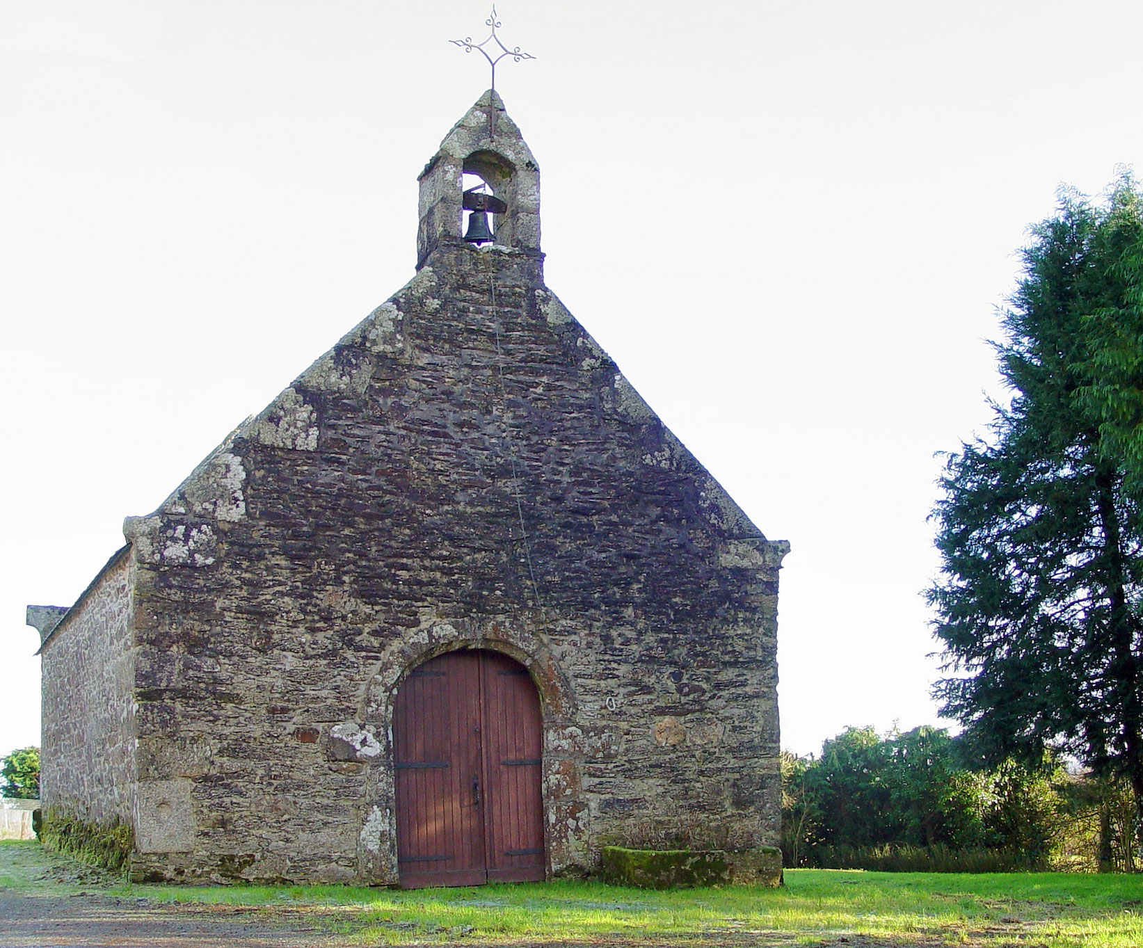 Collorec (Bretagne, Finistère ) Kapelle Saint Guénolé (1512)